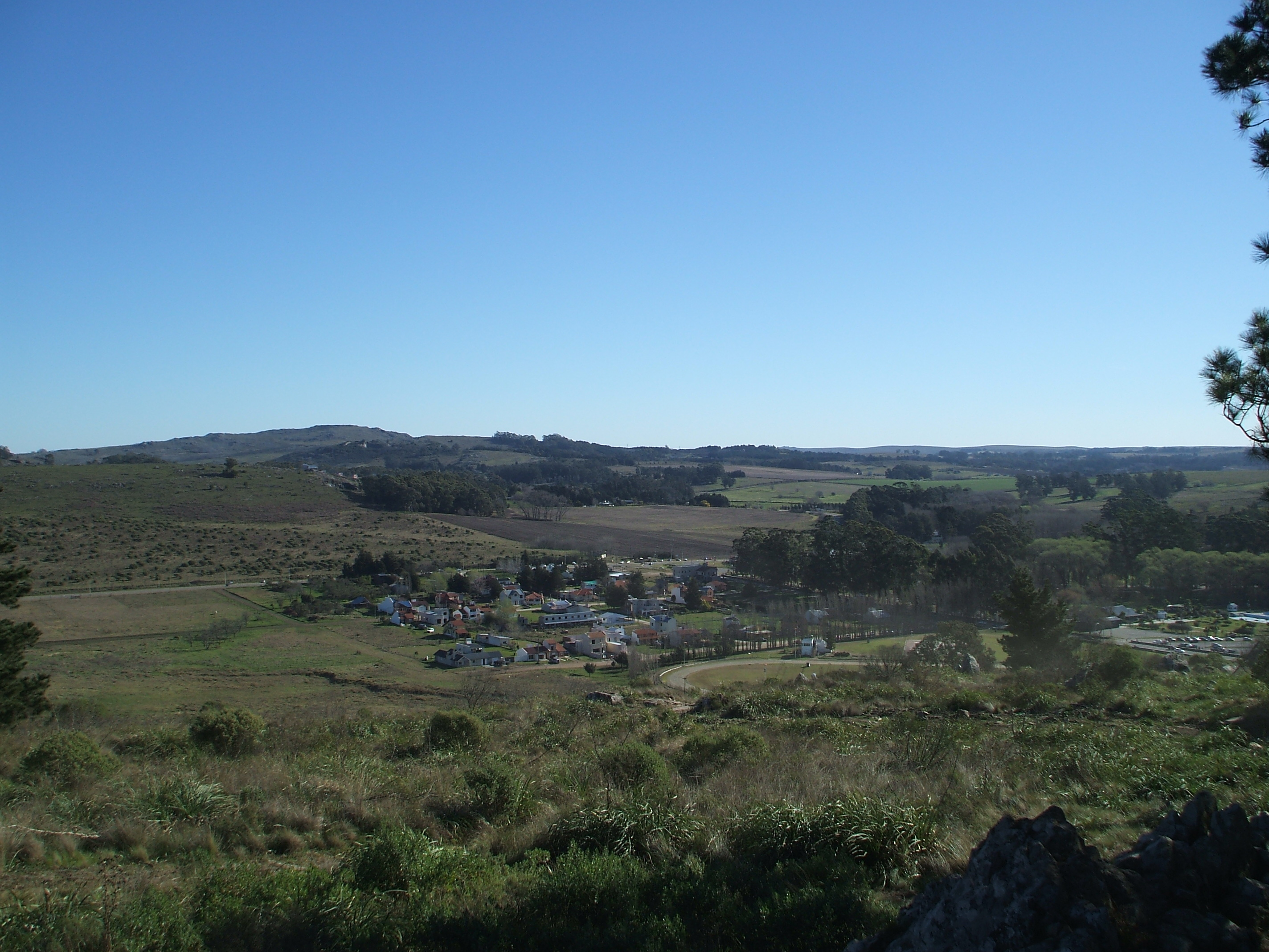 Cerros en Tandil